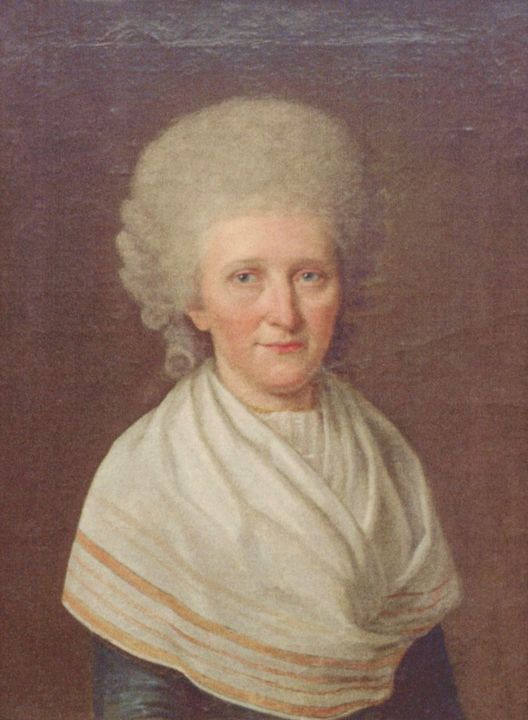 Johanna Friederike von Pfleiderer, geb. Gaum (1756-1822), Ehefrau von Christoph Friedrich von Pfleiderer